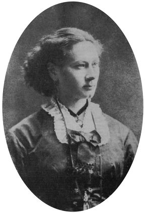 Isala Van Diest, première femme universitaire et première femme médecin de Belgique